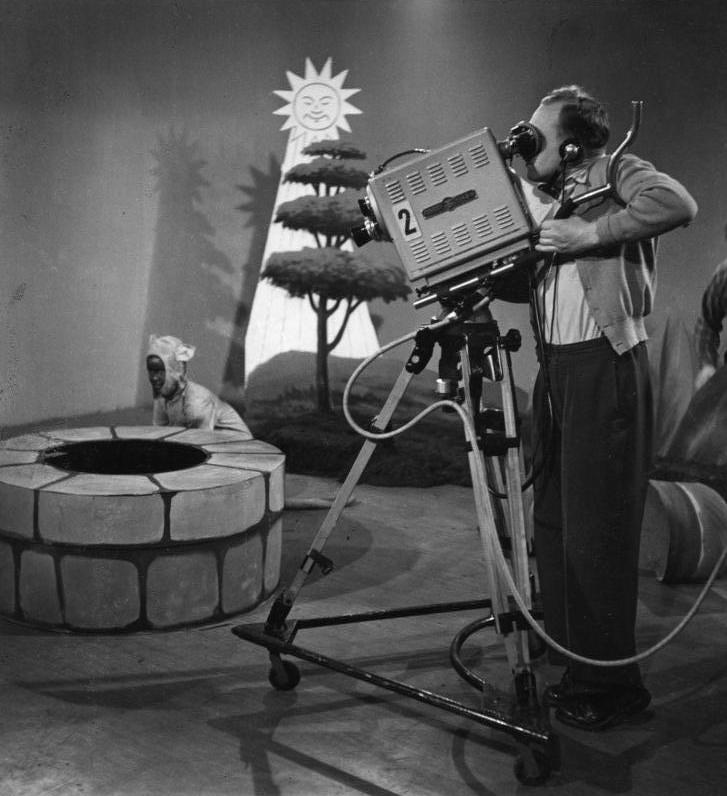 Fernsehstudio Köln Kameramann Kerndorf während einer Originalsendung an dem Stück "Der Struwelpeter".